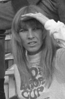 Nederlandse ploeg in Knokke. Floortje Klomp.